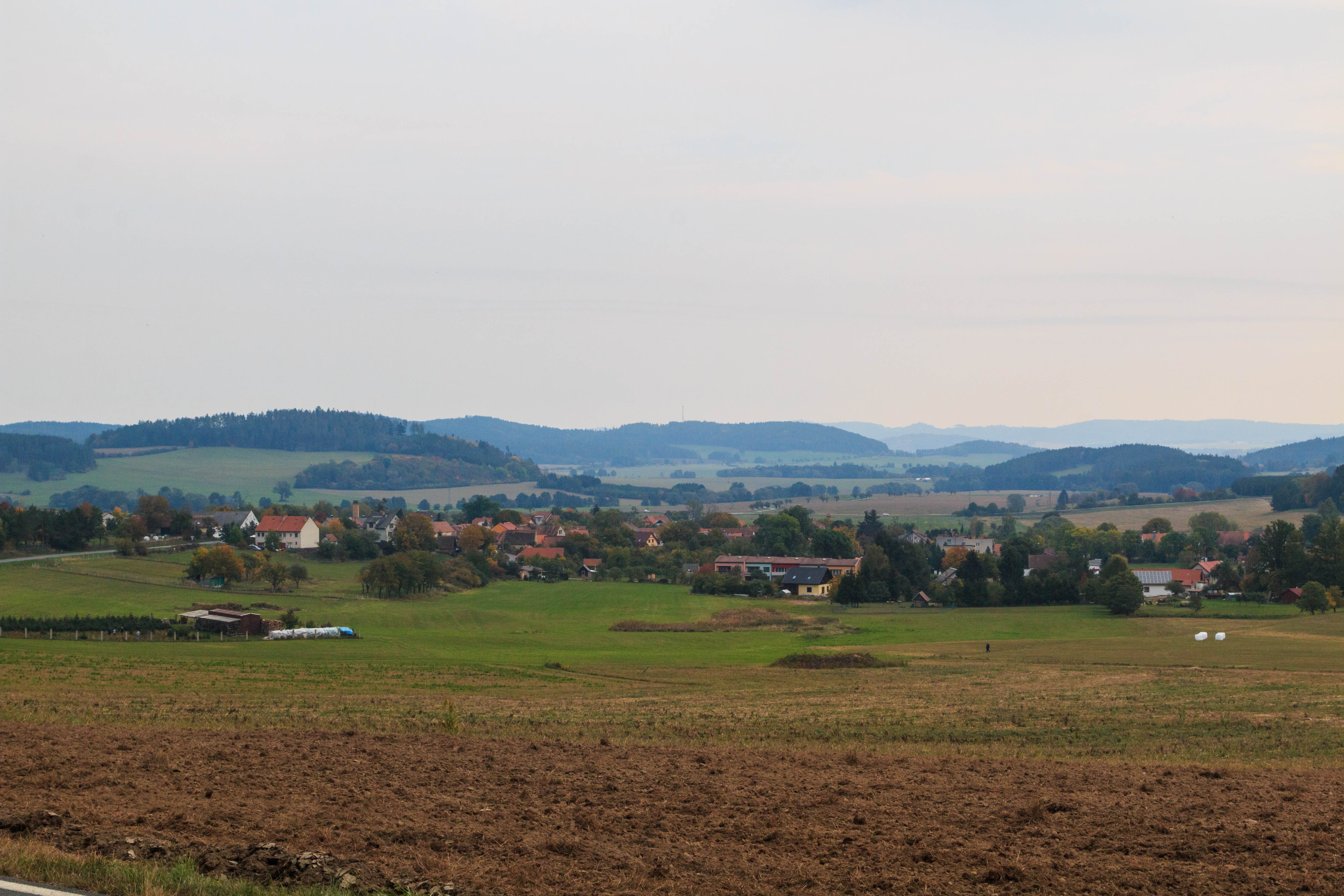 Chlumany - pohled ze silnice do Pěčnova